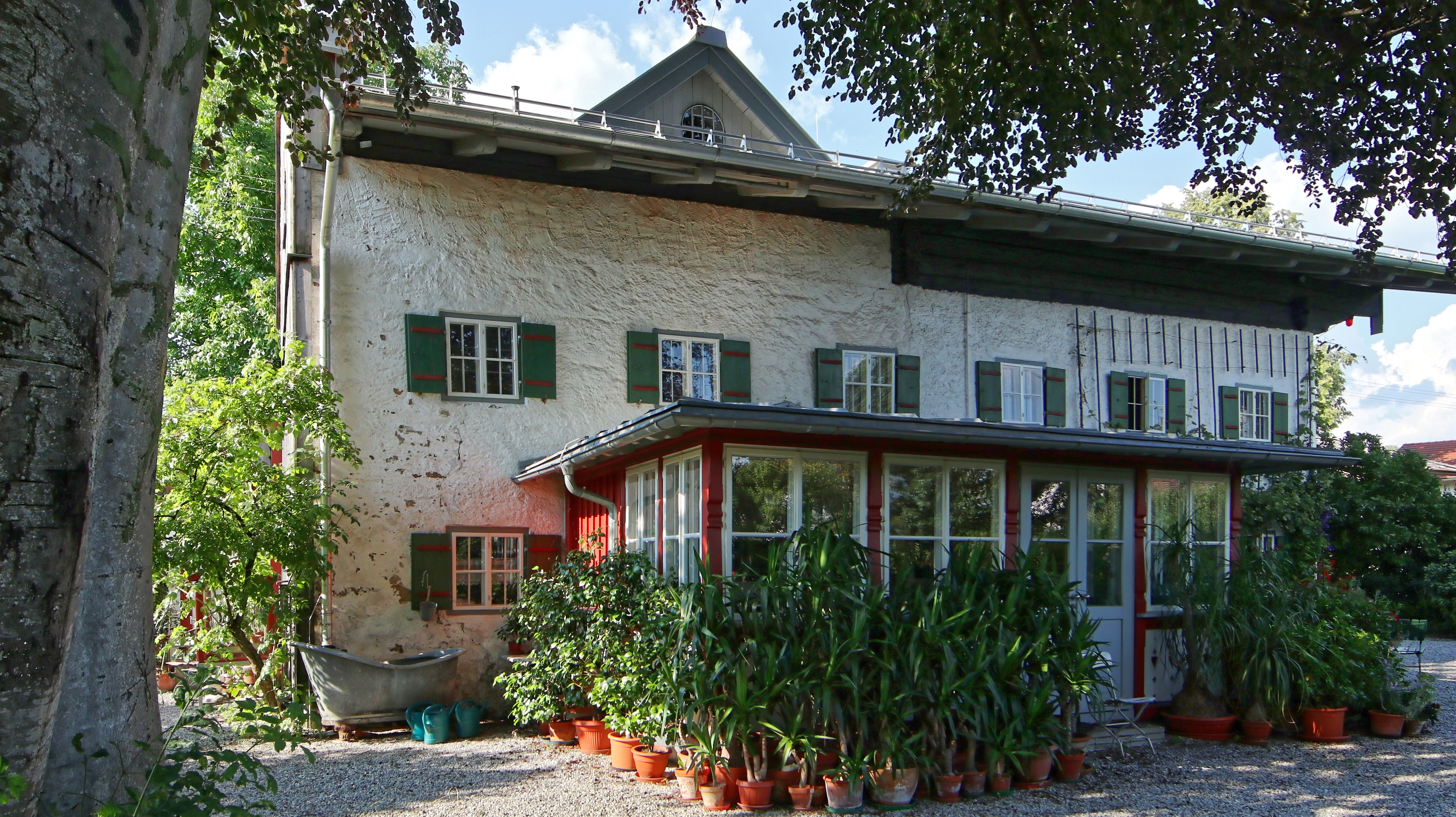 Exterhaus von außen mit Garten und Topfpflanzen